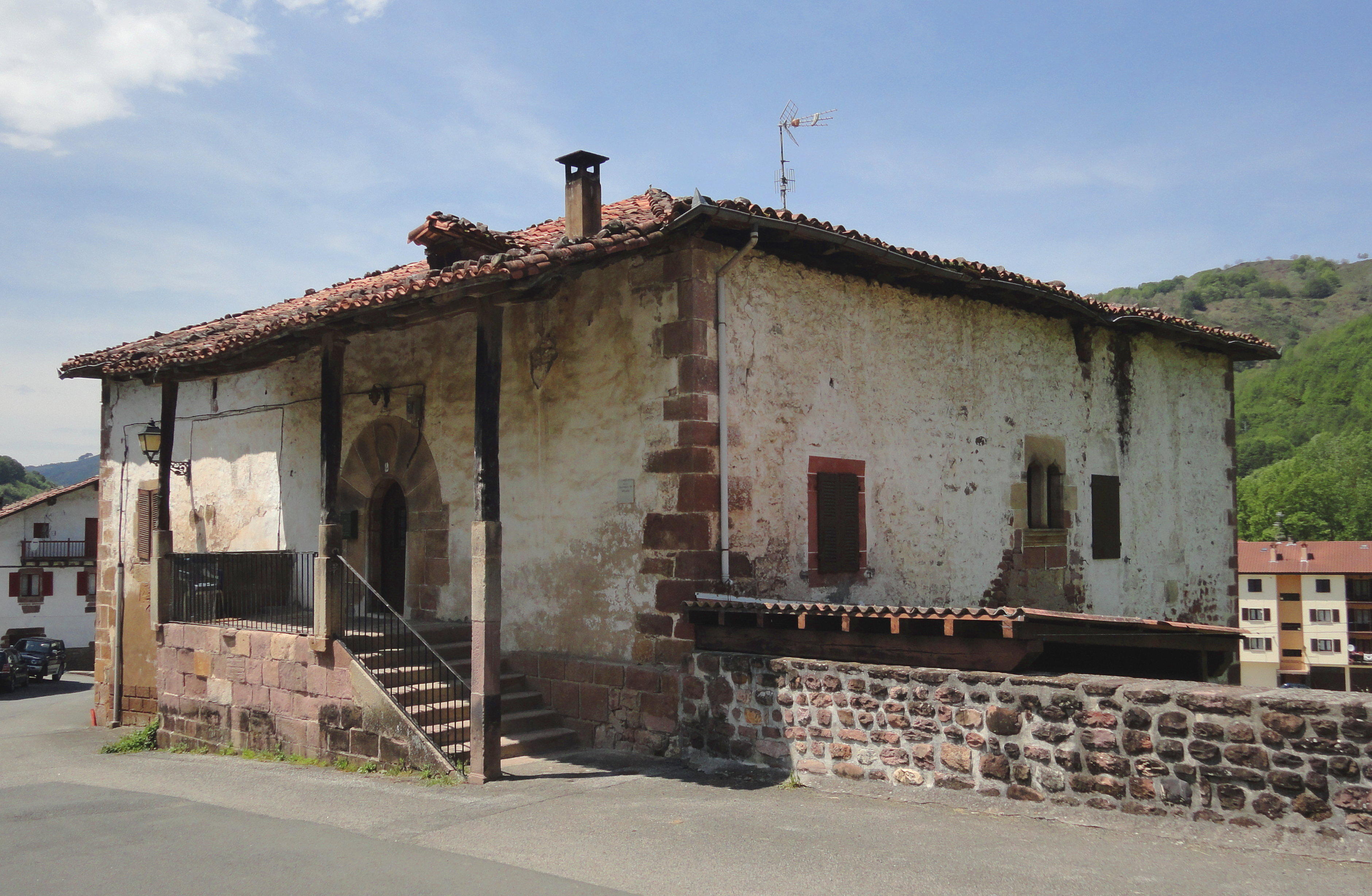 Vicuña jauregia. Arraioz, Baztan